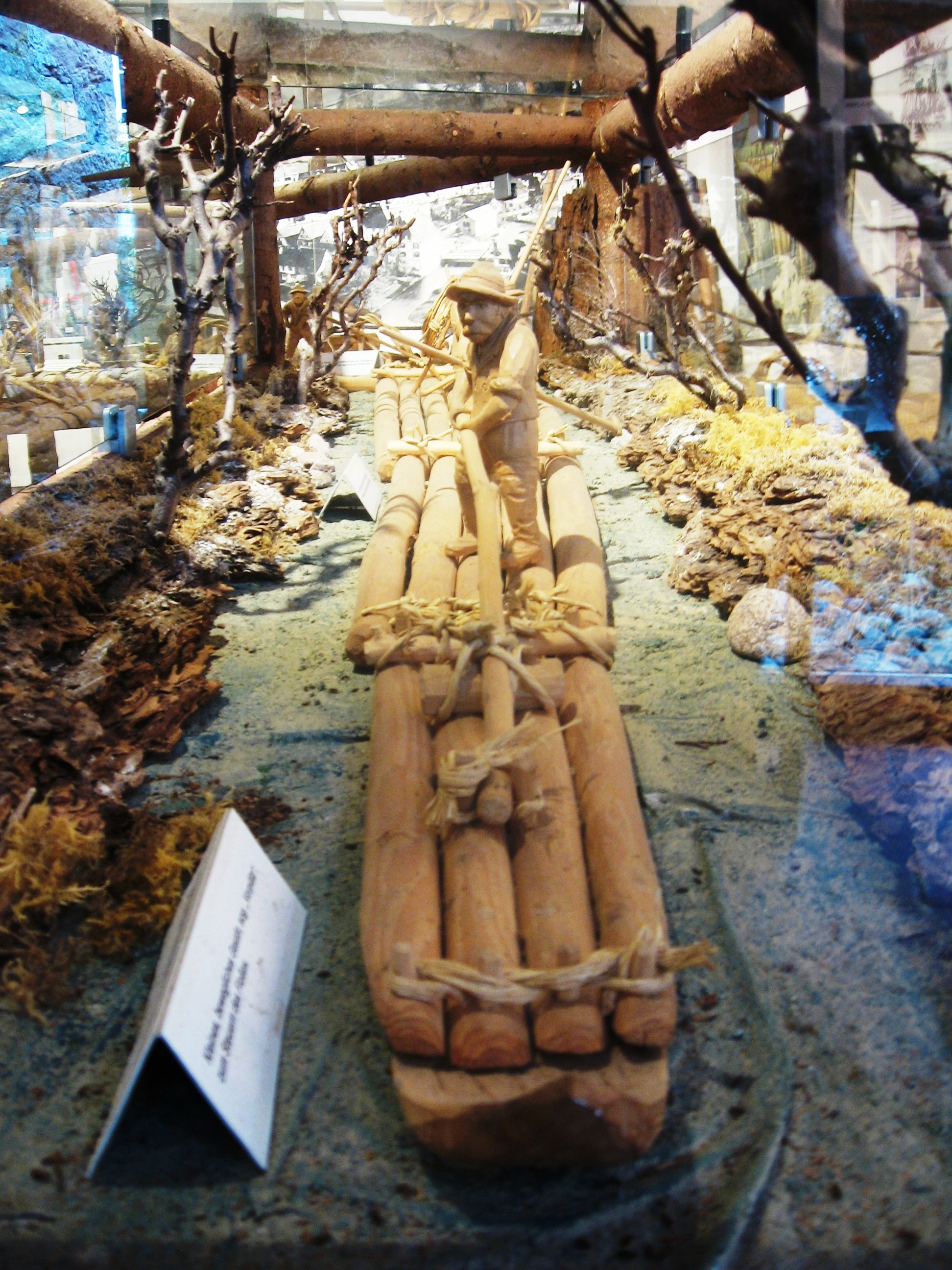 Museum Schüttesäge Schiltach, Floßmodell in der Ausstellung Flößerei